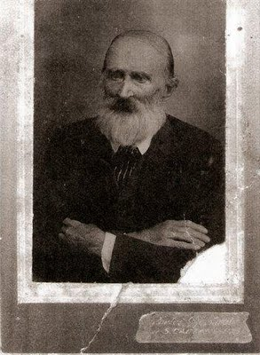 Jacob Philip Wingerter